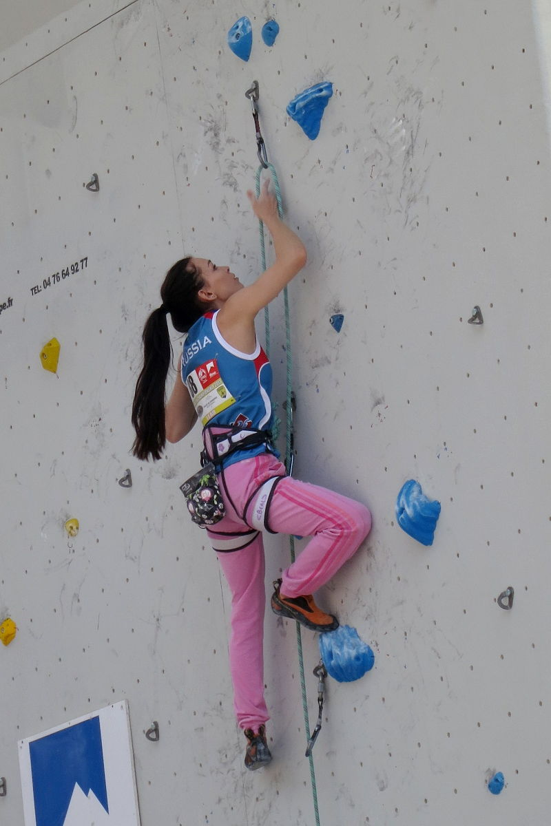 Dinara Fakhritdinova en demi-finale du championnat d'Europe d'escalade (difficulté) 2013 à Chamonix